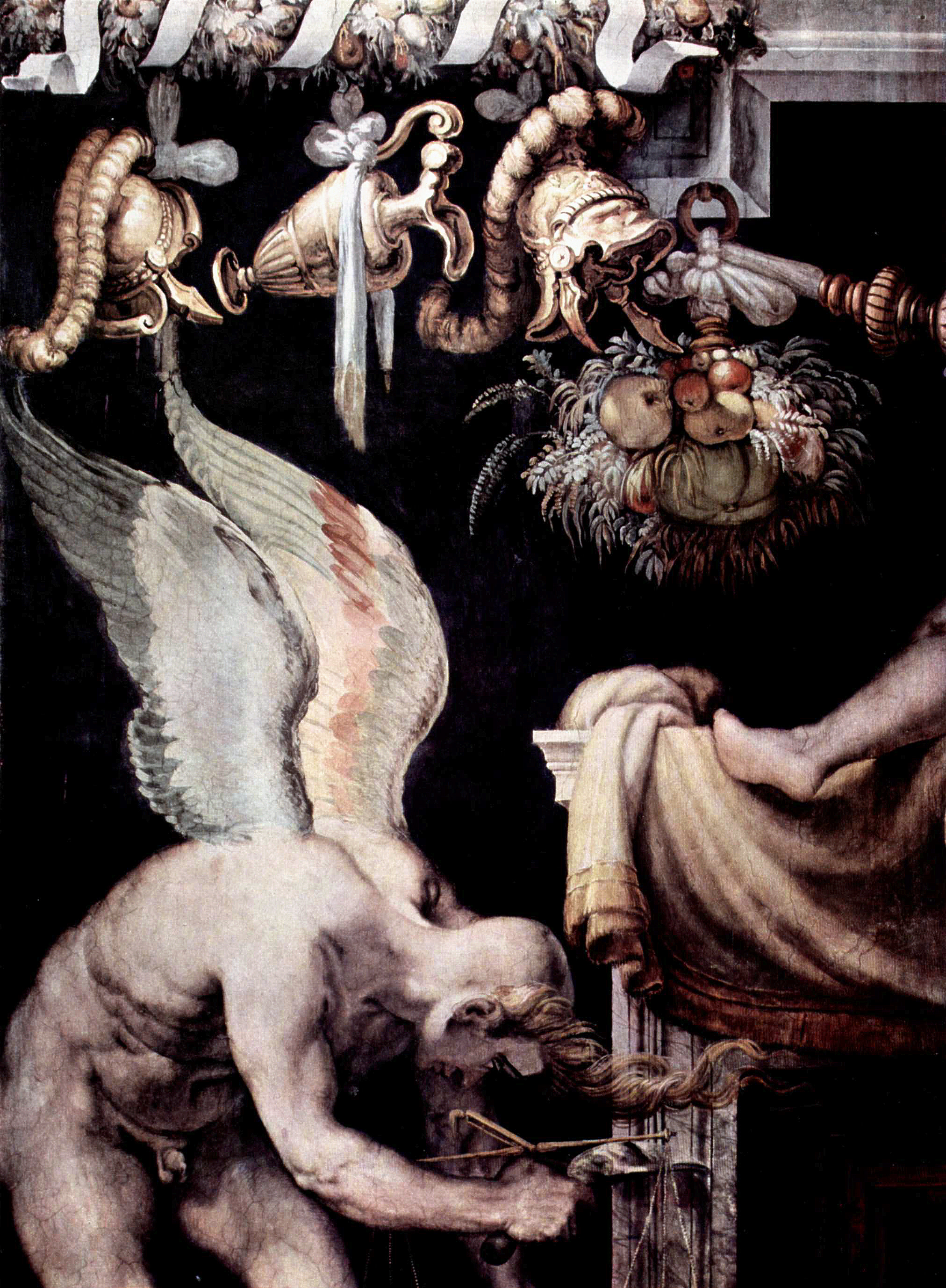 detail